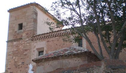 Iglesia parroquia de Tordelpalo. Siglo XVIII